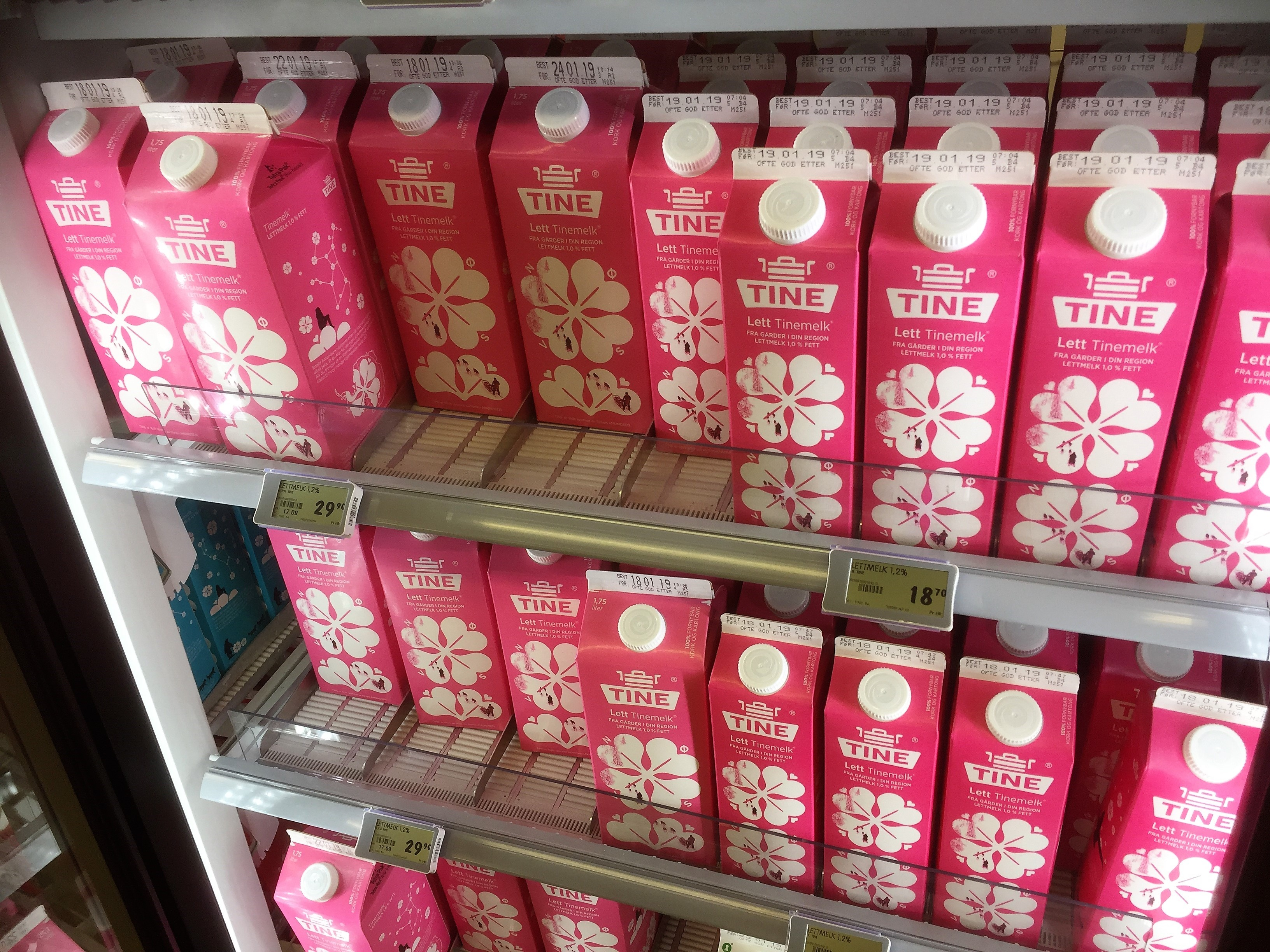 Kartonger med lettmelk i butikk